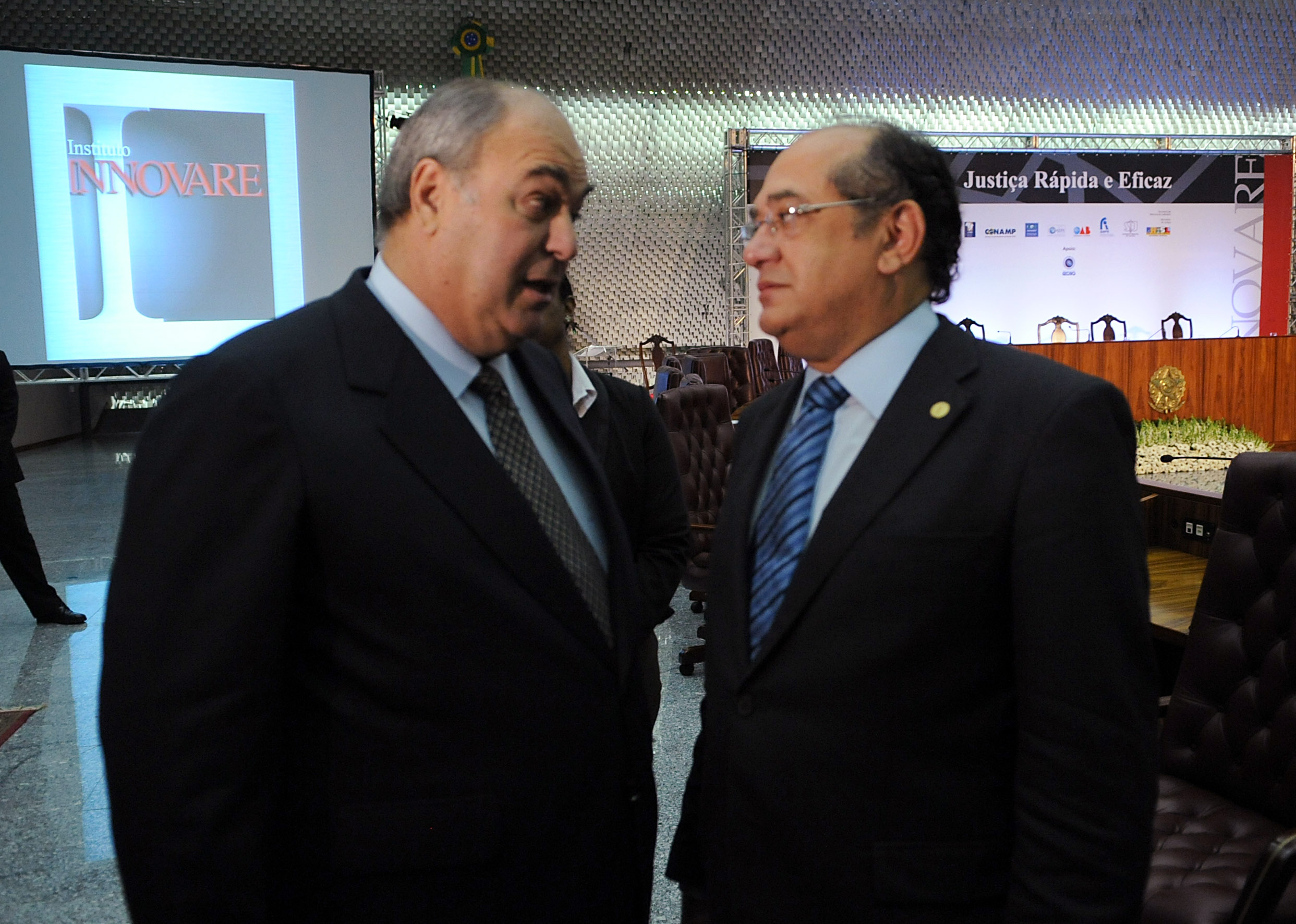 O presidente das Organizações Globo, Roberto Irineu Marinho, conversa com o presidente do Supremo Tribunal Federal (STF), Gilmar Mendes, após cerimônia de lançamento do 6º prêmio Innovare sobre o tema "Justiça Rápida e Eficaz".